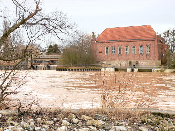 Schneller Graben in Hannover